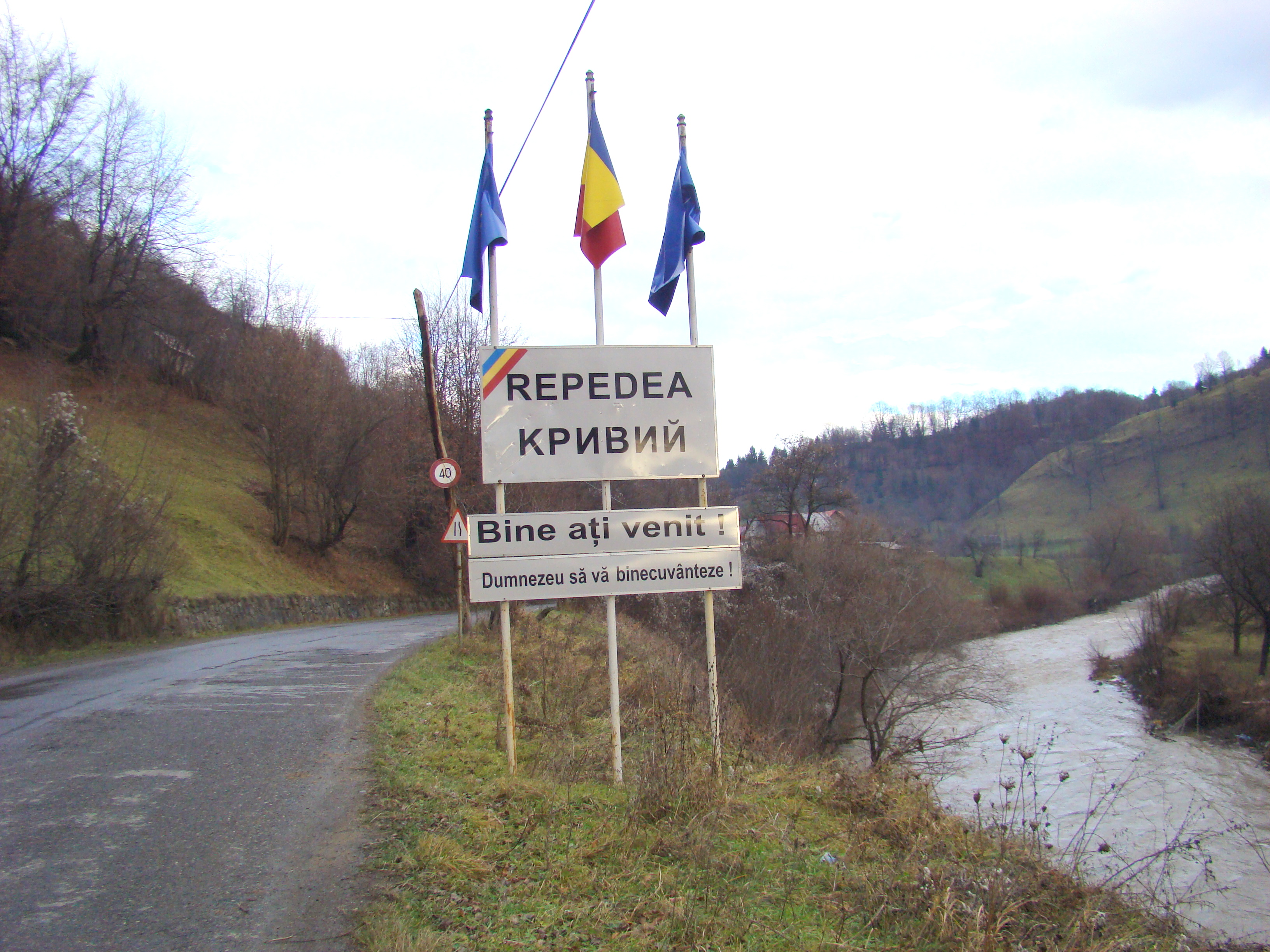 Repedea, Maramureș